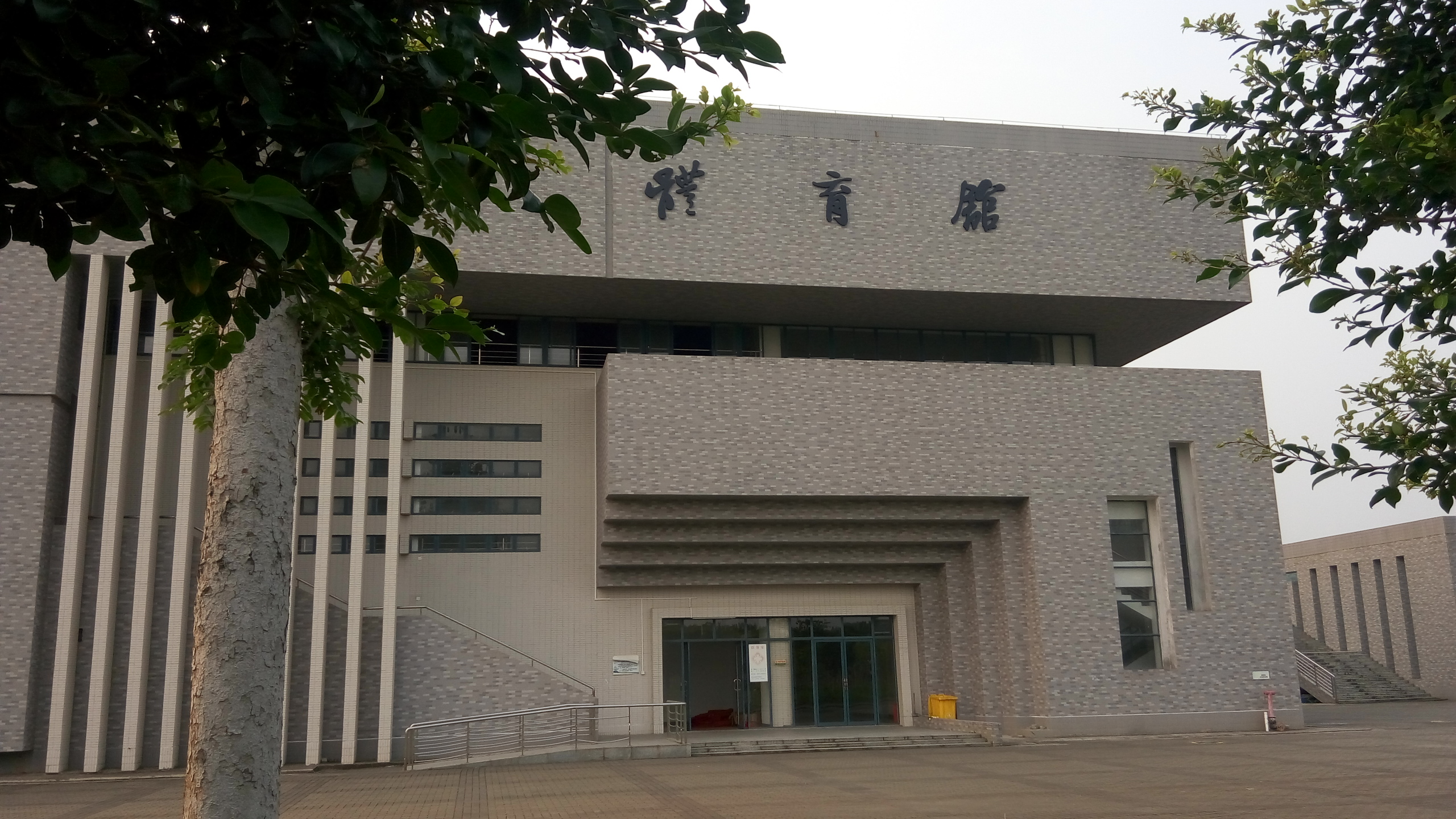 中文（中国大陆）: 广东南华工商职业学院体育馆